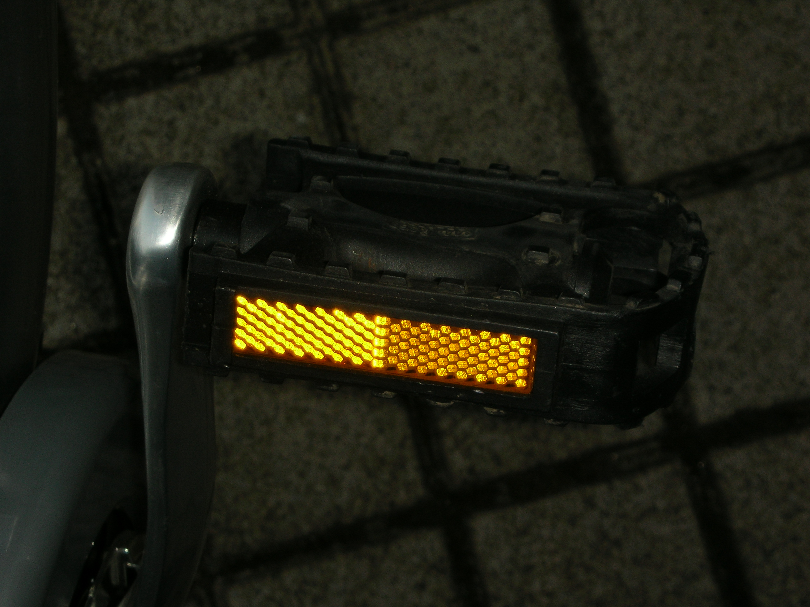 Rückstrahler an Fahrradpedal, passive Beleuchtung, das Licht wird in die Richtung zurückgestrahlt, aus der es kommt. Die Aufnahme mit Blitzlicht verdeutlicht den Effekt.